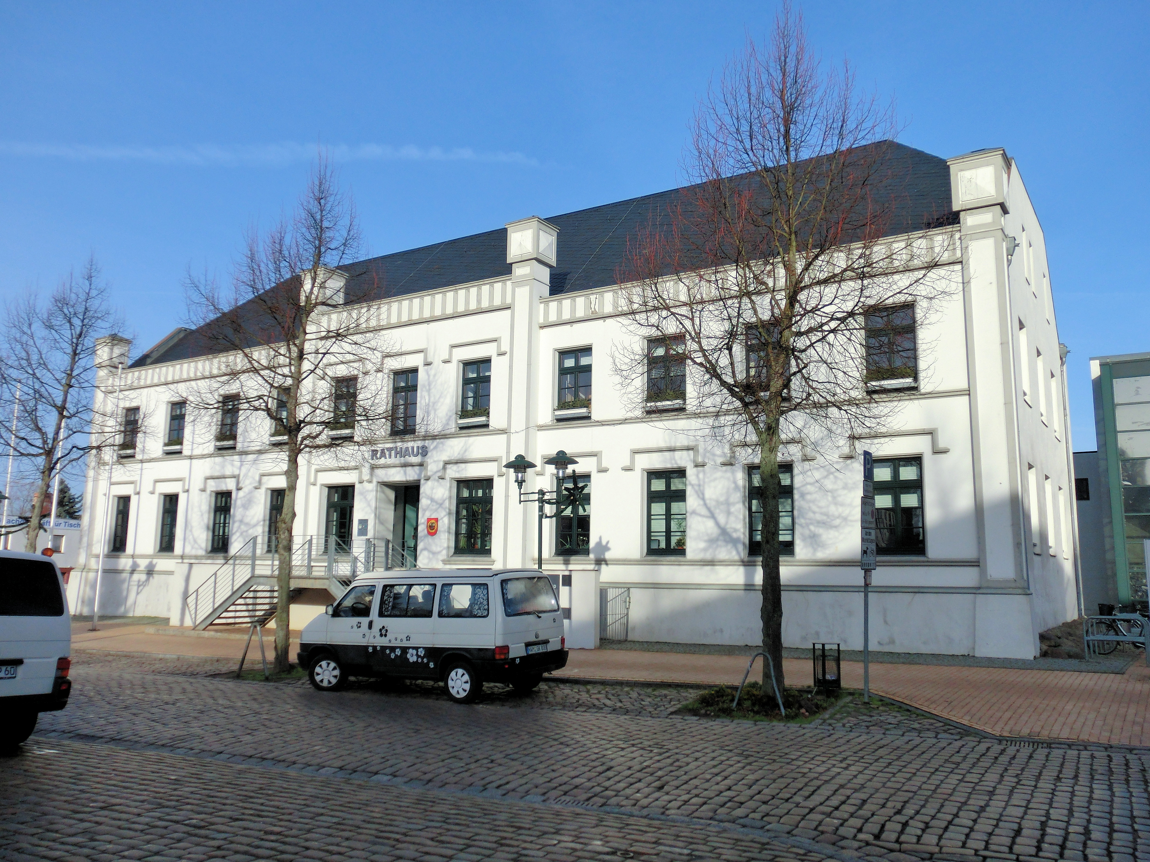 Grevesmühlen, Rathaus